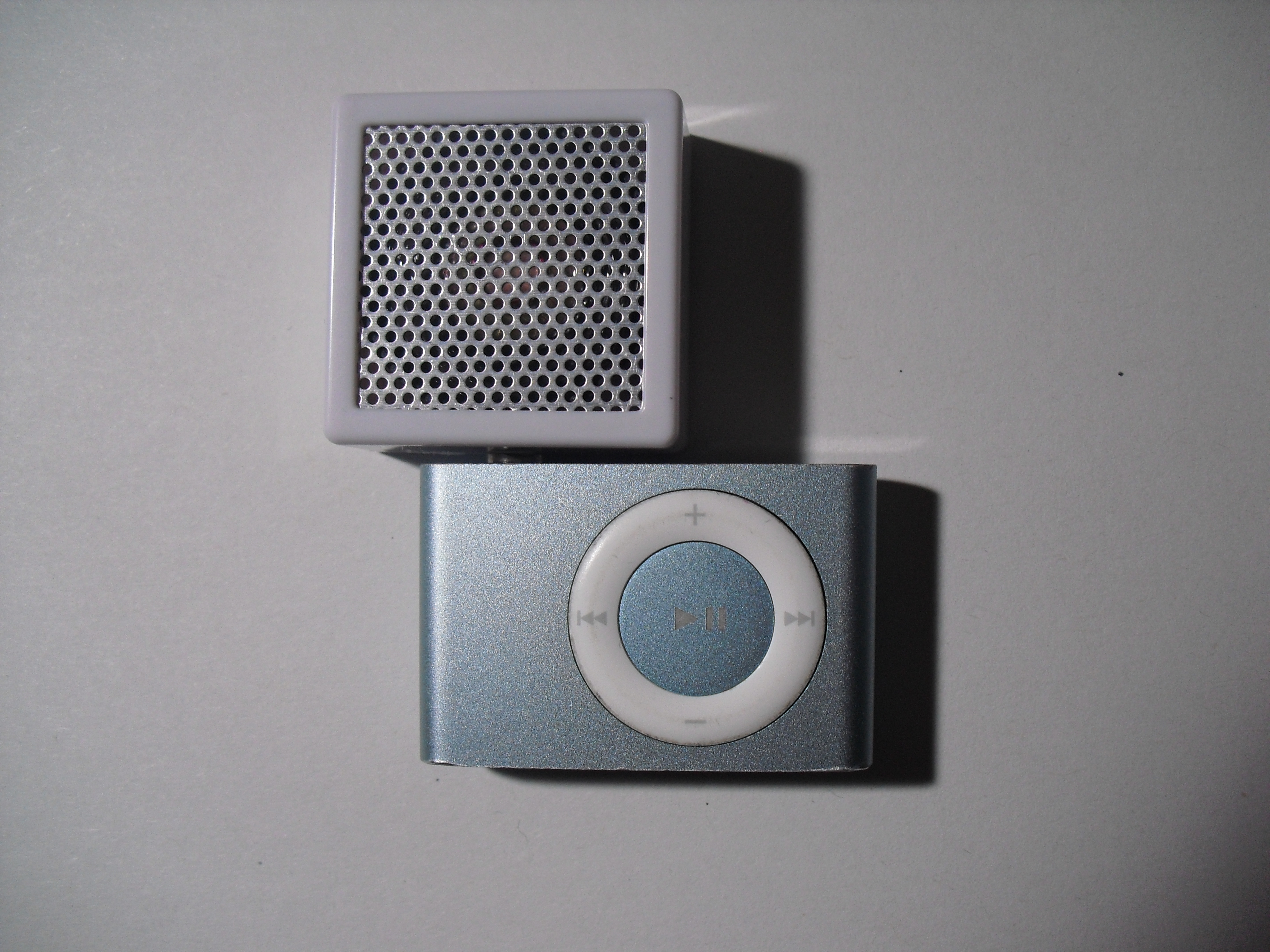 iPod shuffle第二代播放器与一个迷你音响。